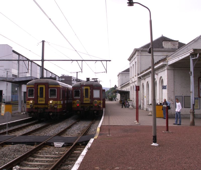 Gare de Spa